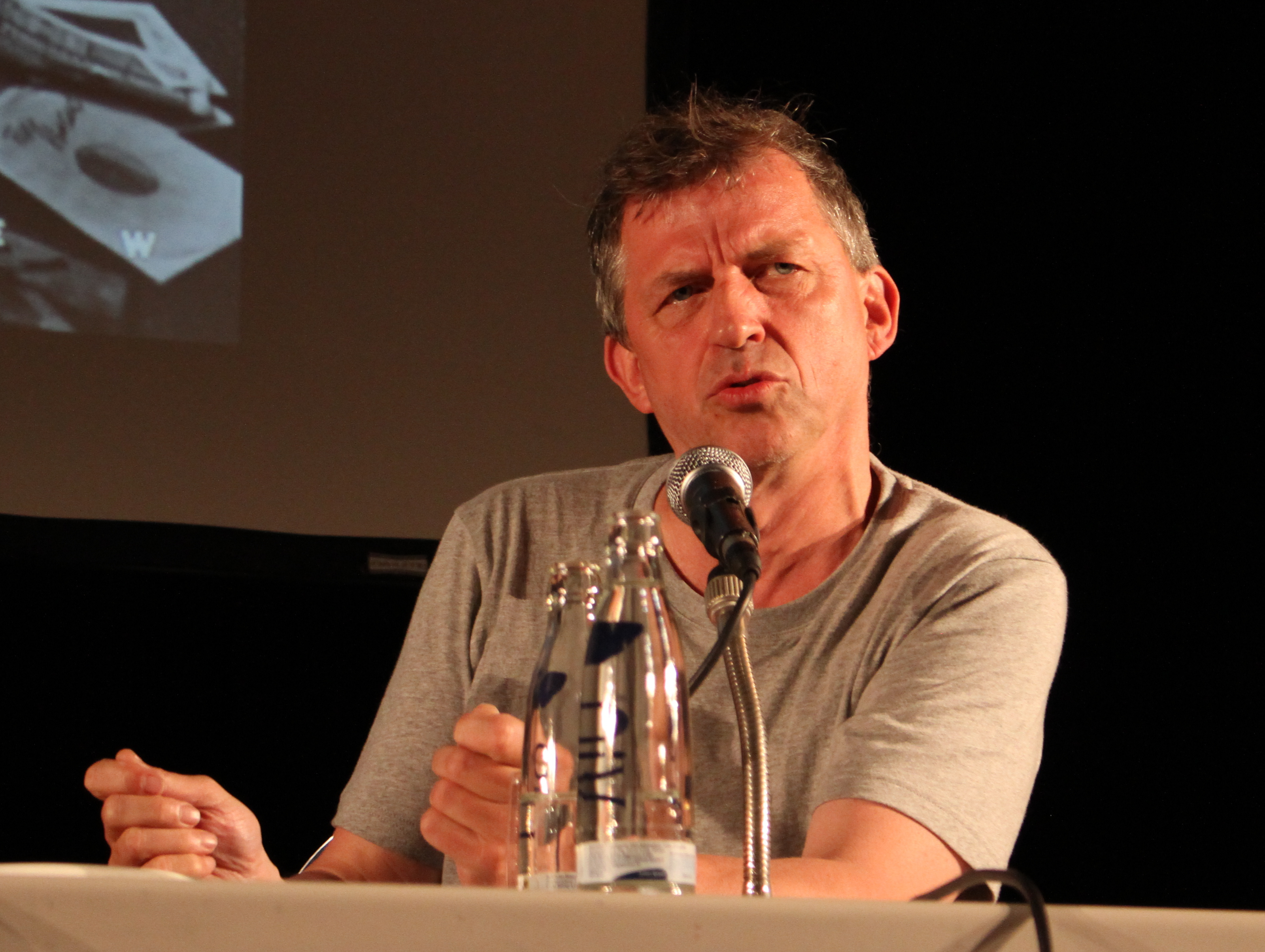 Wolfgang Müller im Haus der Kunst, München